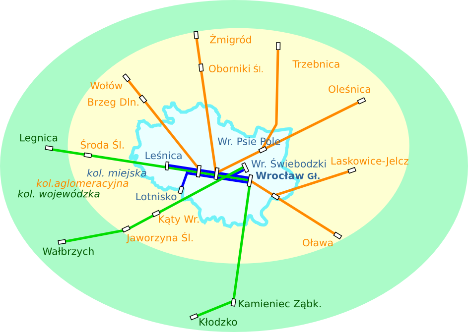 Żródlo